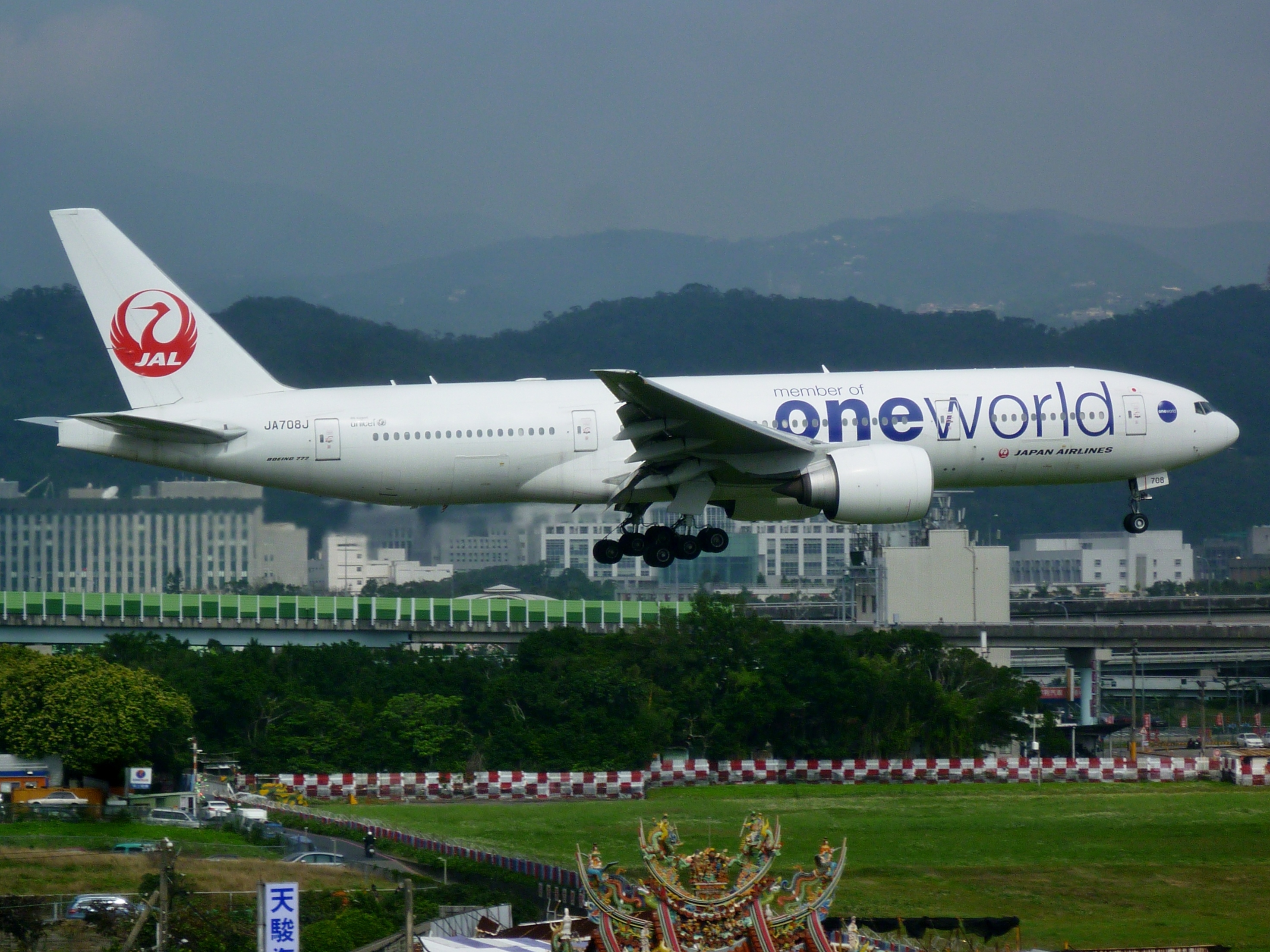 日航一架波音777-200ER JA708J 寰宇一家彩繪客機